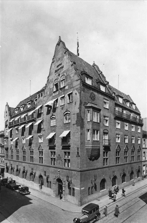 Hotel Bristol i Oslo, biler, mennesker. Postkort